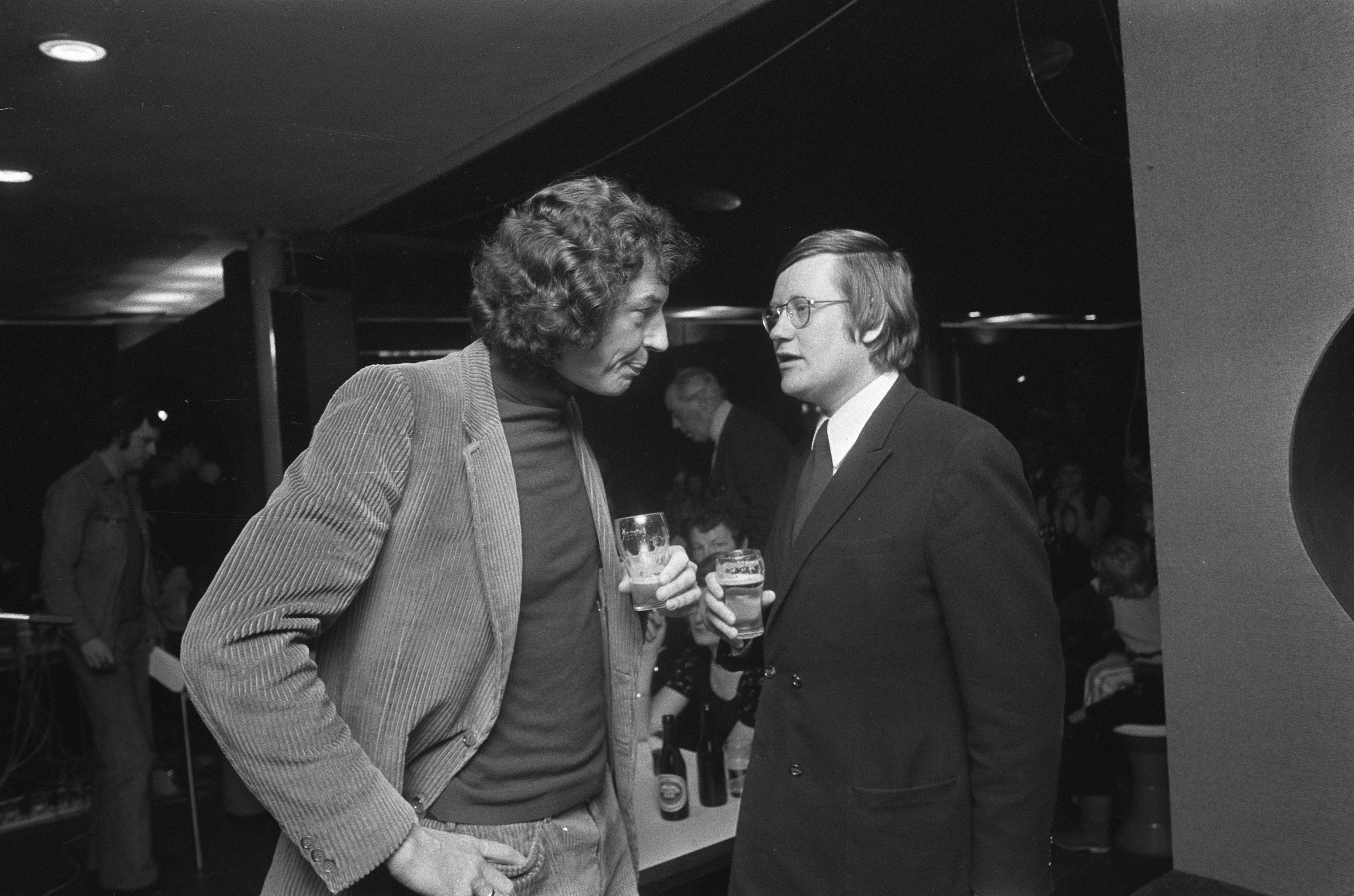 Collectie / Archief : Fotocollectie Anefo Reportage / Serie : Debat tussen Van Thijn en Wiegel in VARA's Rode Haan Beschrijving : Wim Kok (NVV) en Hans Wiegel (r) in gesprek Datum : 9 maart 1974 Locatie : Hilversum, Noord-Holland Trefwoorden : parlementariers, radiostudio's Persoonsnaam : Kok, Wim, Wiegel, Hans Instellingsnaam : NVV Fotograaf : Fotograaf Onbekend / Anefo Auteursrechthebbende : Nationaal Archief Materiaalsoort : Negatief (zwart/wit) Nummer archiefinventaris : bekijk toegang 2.24.01.05 Bestanddeelnummer : 927-0529